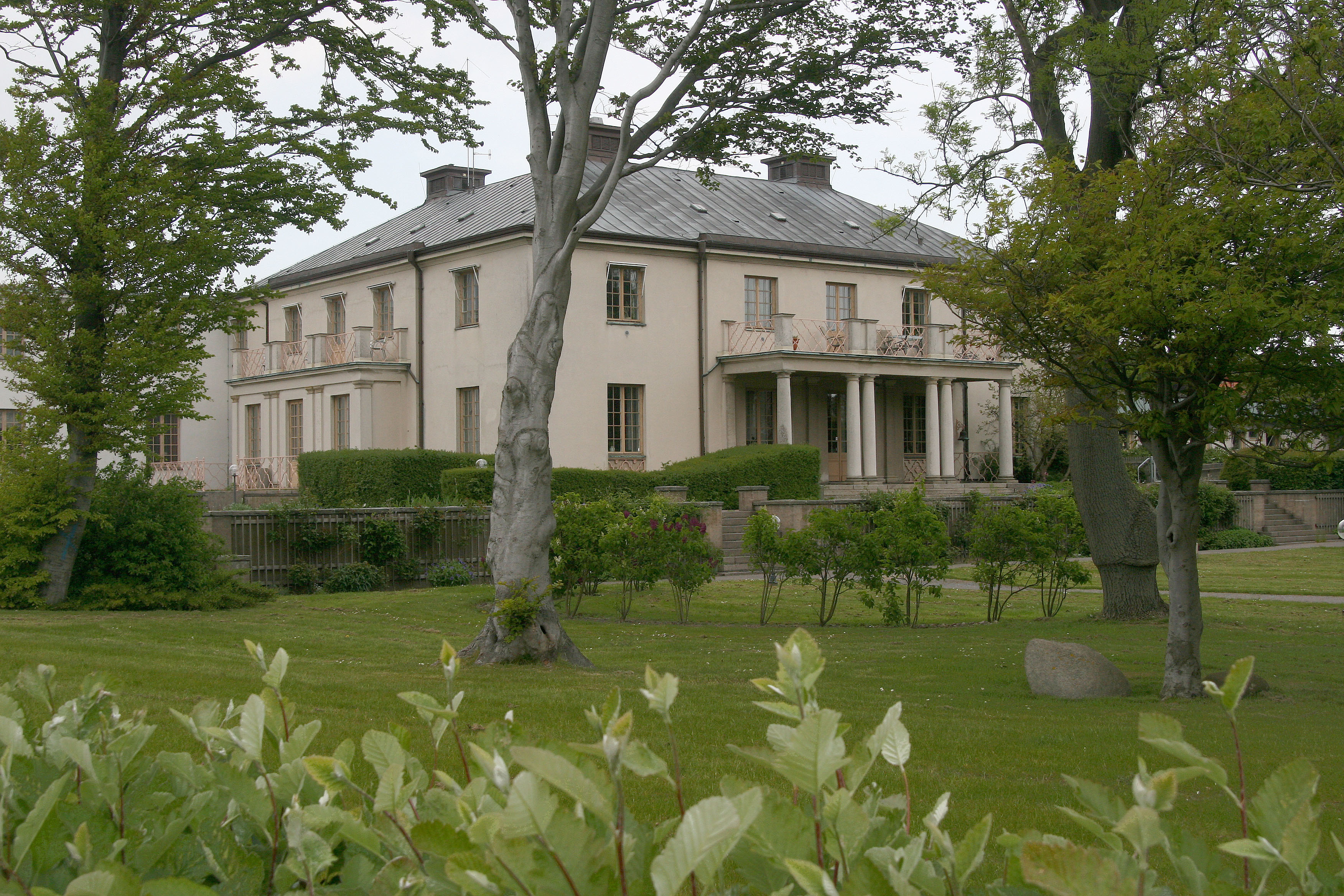 Helsigborg. Dunkerska huset.